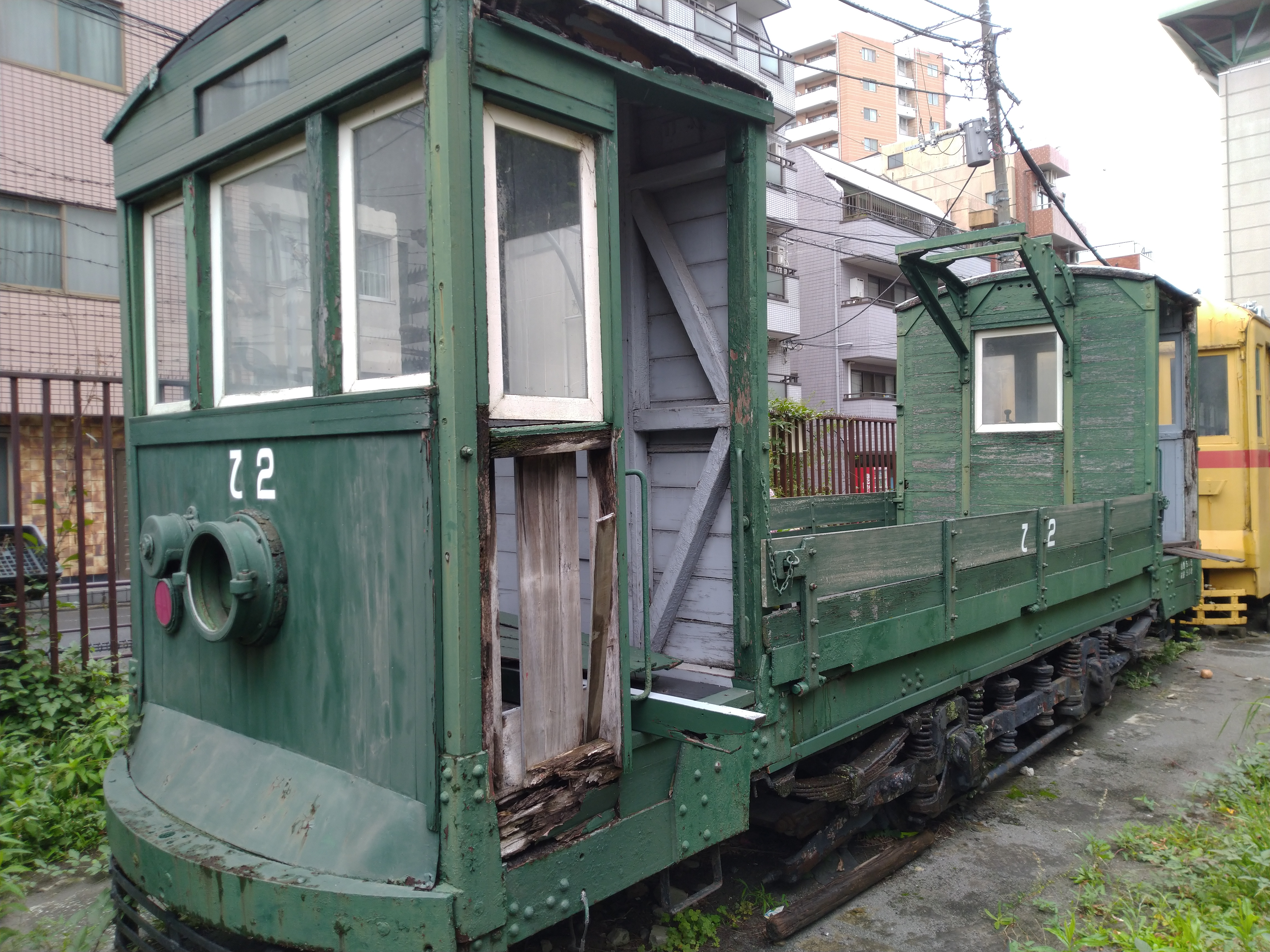 都電乙1形 乙2。東京都文京区 神明都電車庫跡公園に保存。